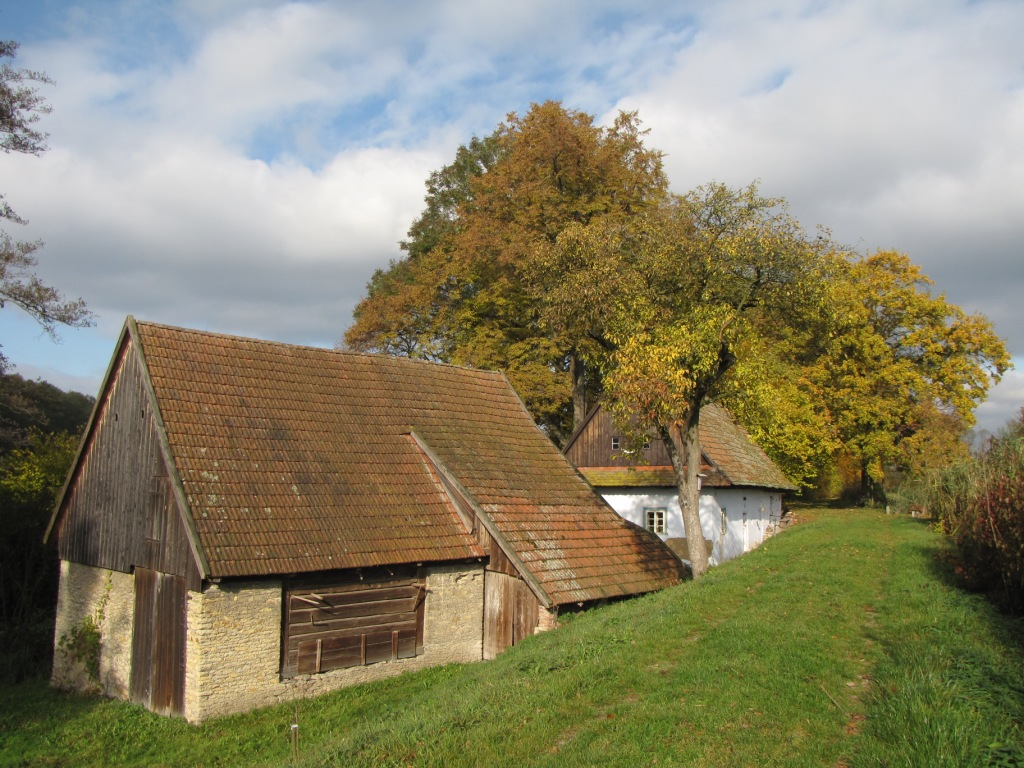 Vodní mlýn Betlém (část obce Zálší)